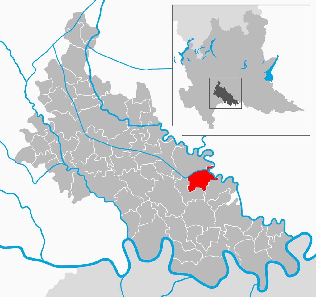 Il comune di Castiglione d'Adda nella provincia di Lodi